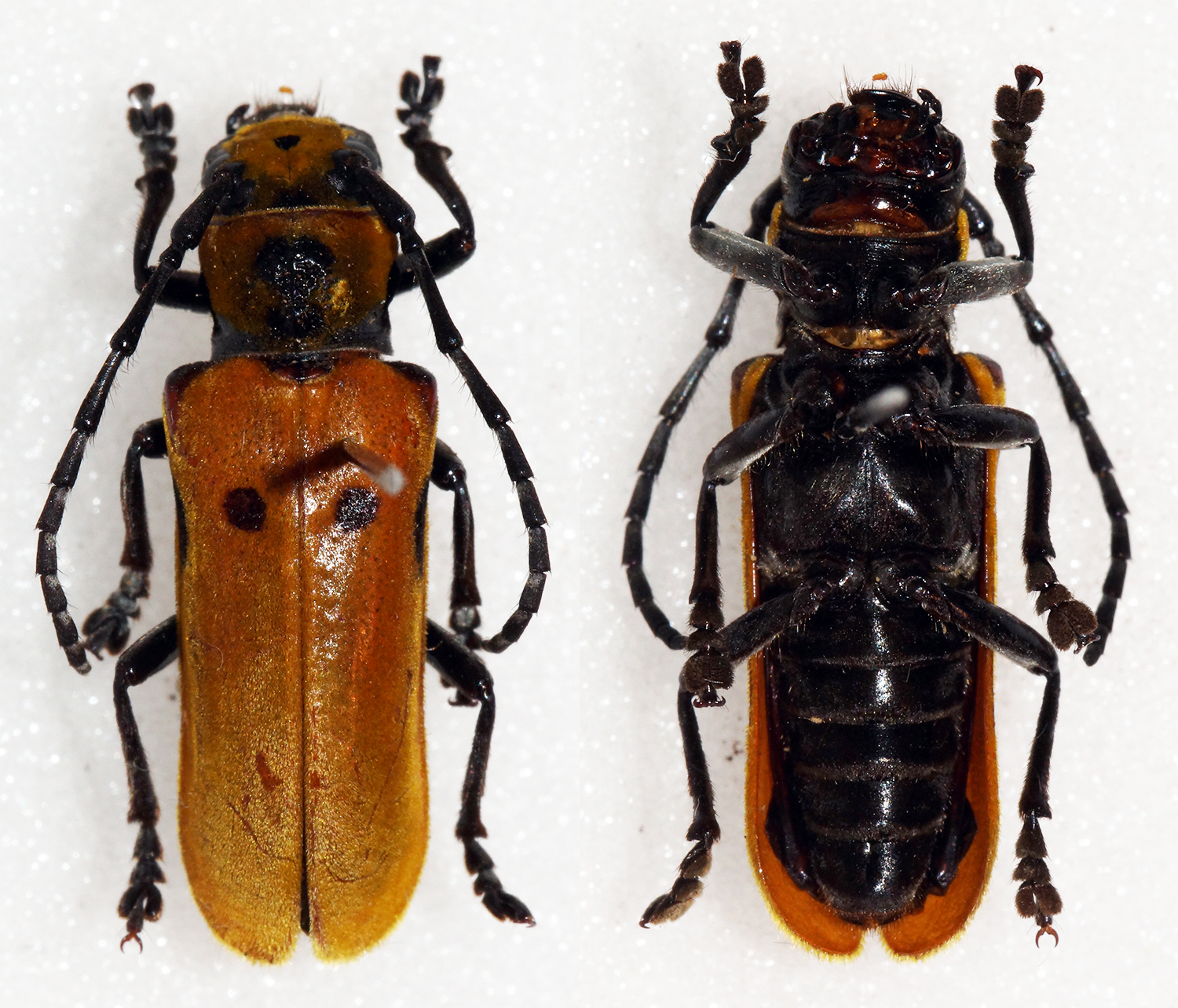 Breuning,1968 Sex: Male Data: 06-2014 - Wiang Pa Pao - Thailand Size: 18.5mm